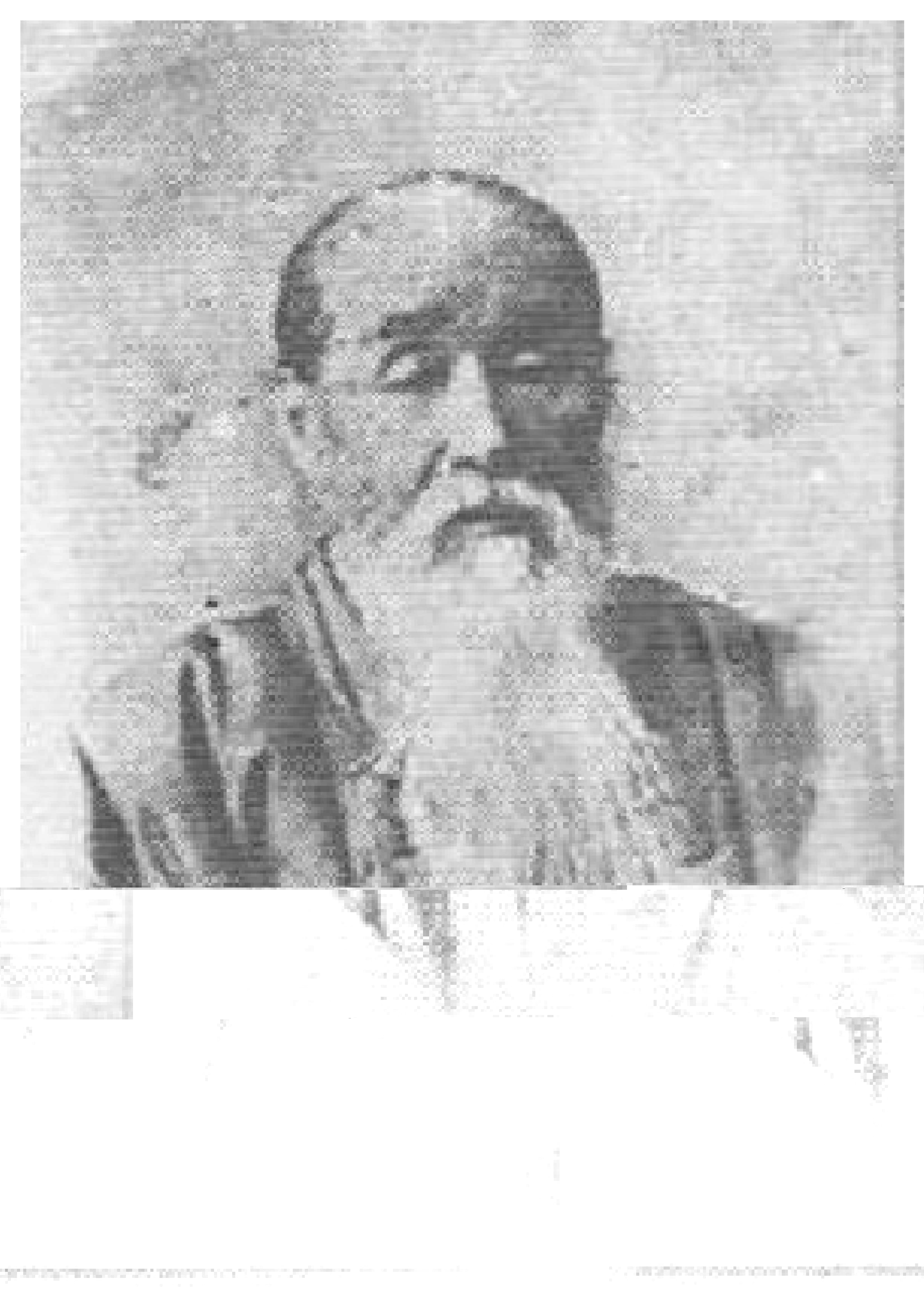 福住正兄像